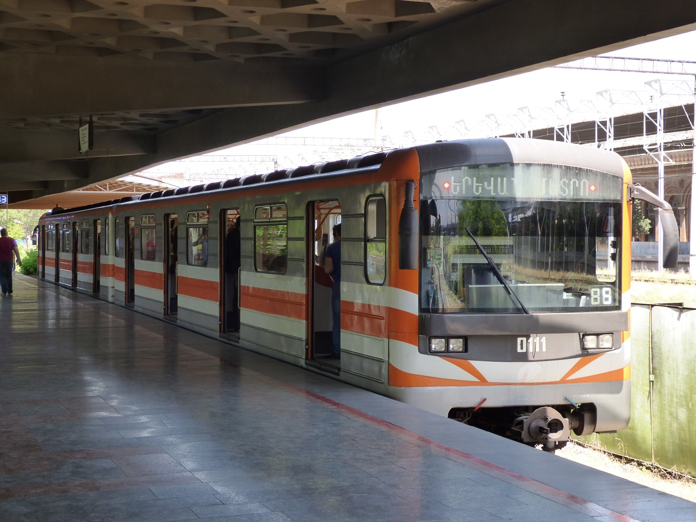 Rame modernisée de deux voitures du métro d'Erevan